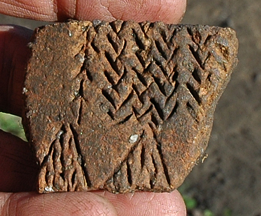 Mellanneolitisk trattbägarkeramik funnen 23 september 2013 vid utgrävning av den neolitiska boplatsen RAÄ-nummer Karleby 63:1 öster om Logården i Karleby socken, Falköpings kommun, Vartofta härad, f.d. Skaraborgs län, Västergötland, Västra Götalands län, Sverige.